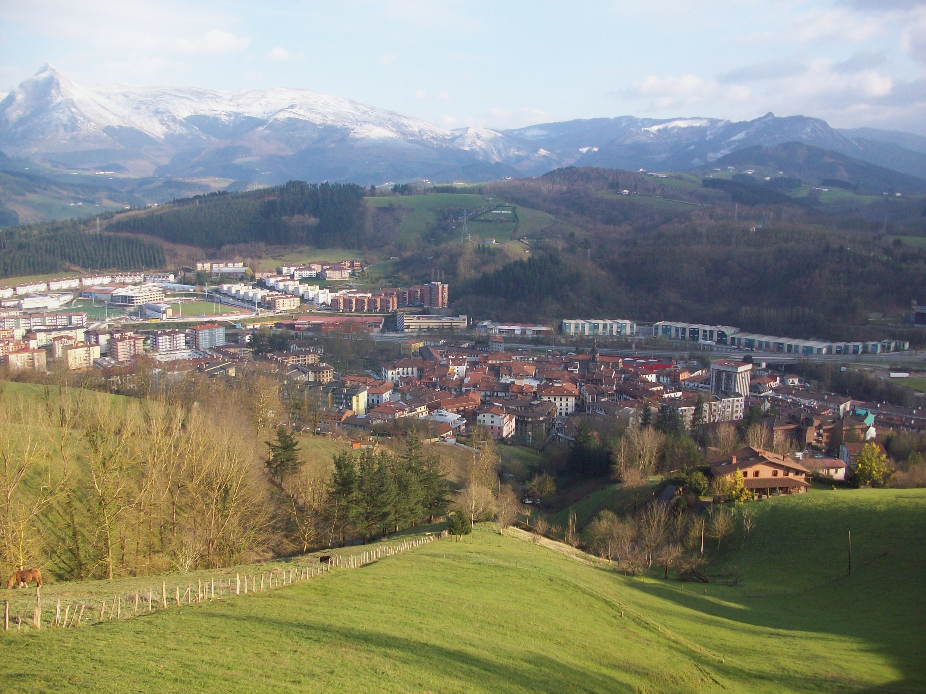 Ordizia, Goierri. Gipuzkoa, Euskal Herria. Ordizia, Goierri. Gipuzkoa, Basque Country.